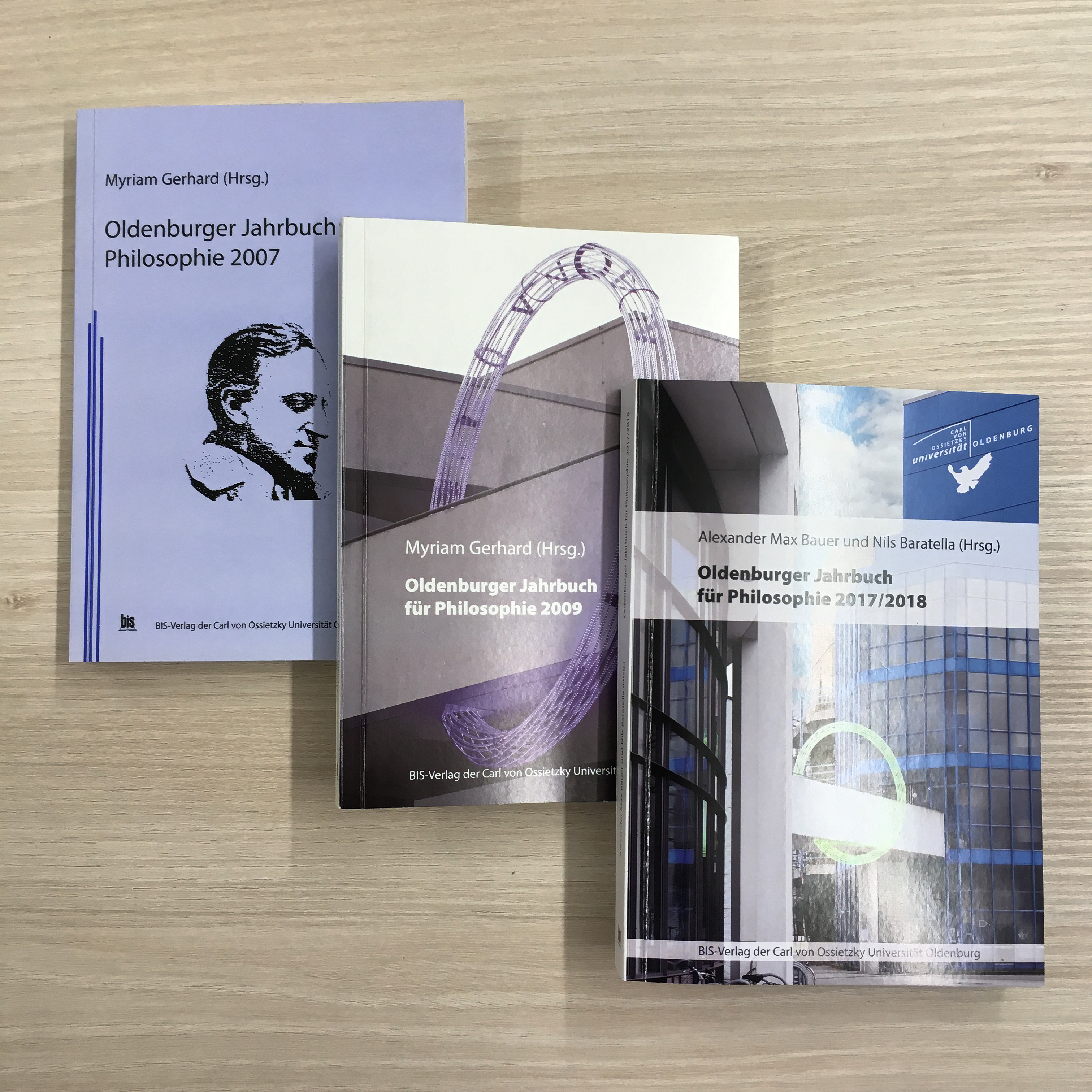 Drei Ausgaben des Oldenburger Jahrbuchs für Philosophie (2007, 2009 und 2017/2018)